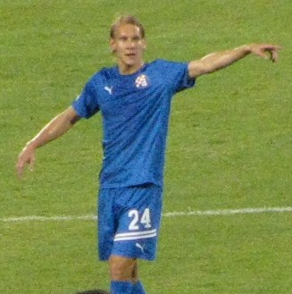 Domagoj Vida